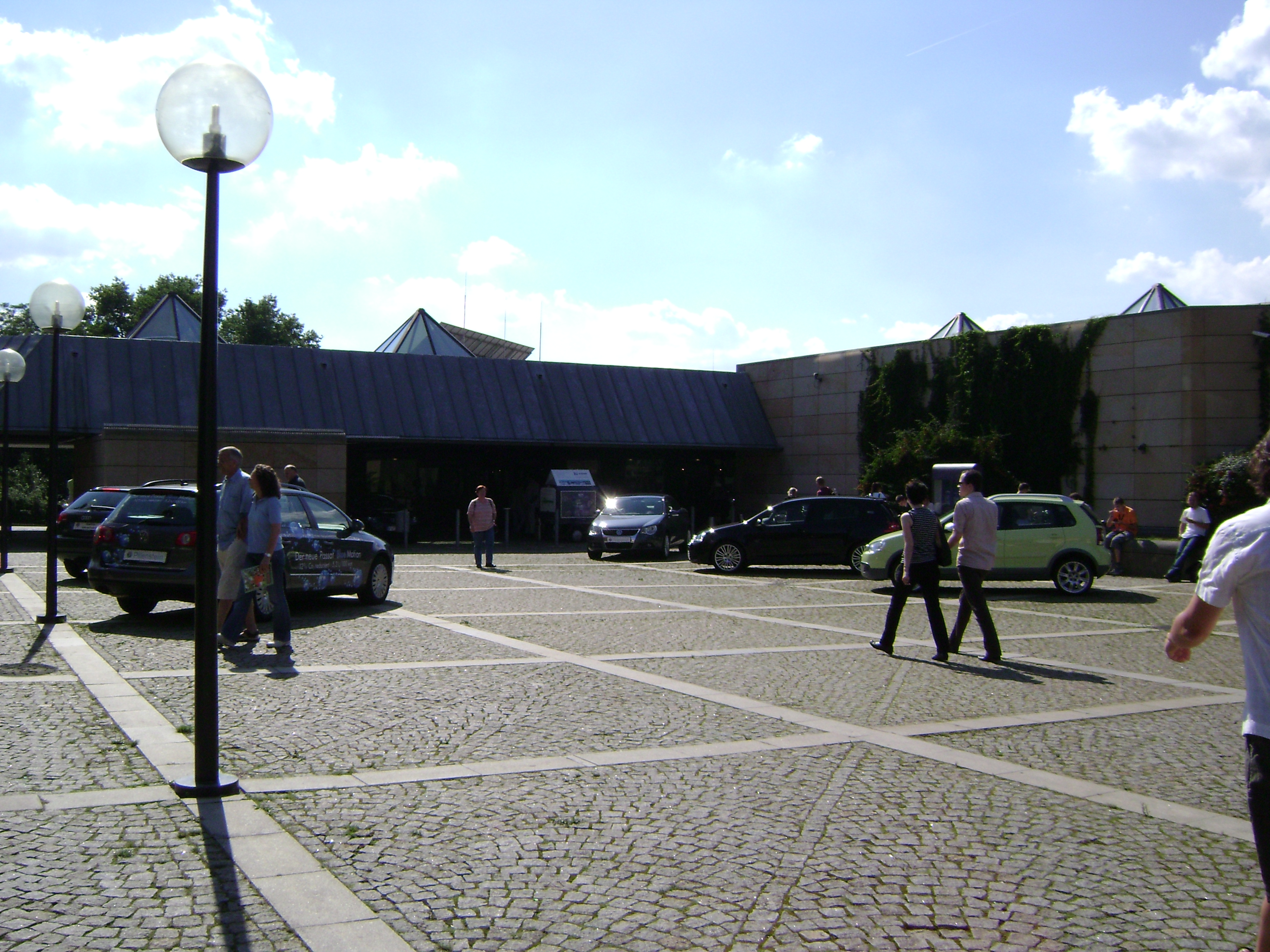 Die Stadthalle in Fürth. Veranstaltungsort der PHC 2007.